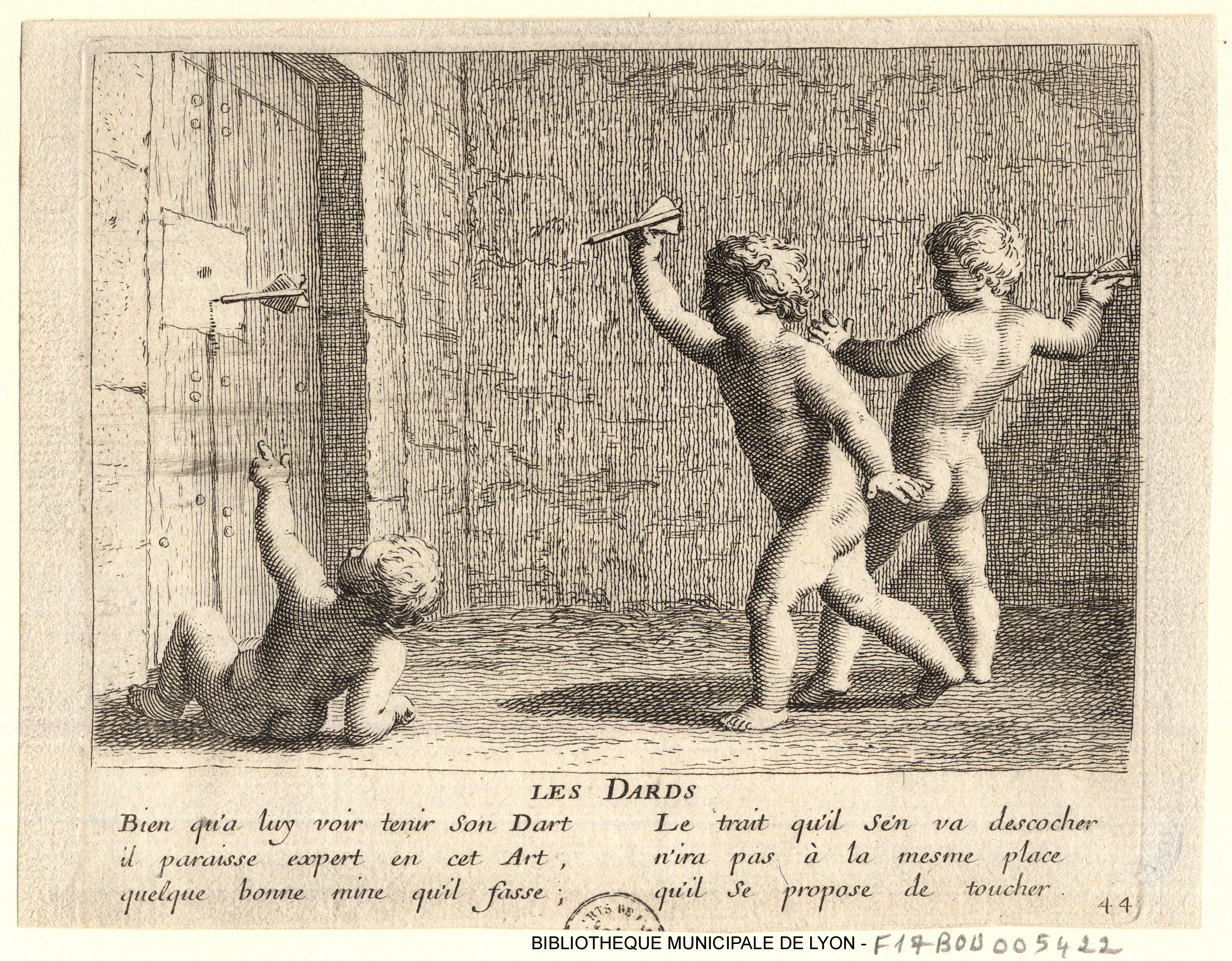 Jeux d'enfants